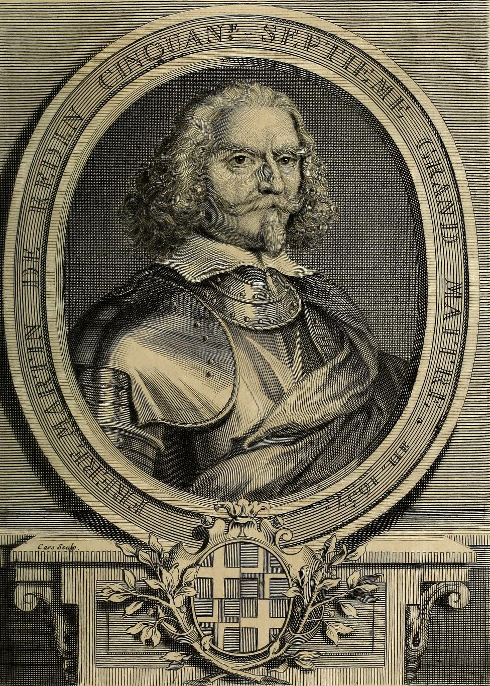 Grand maître de l'Ordre